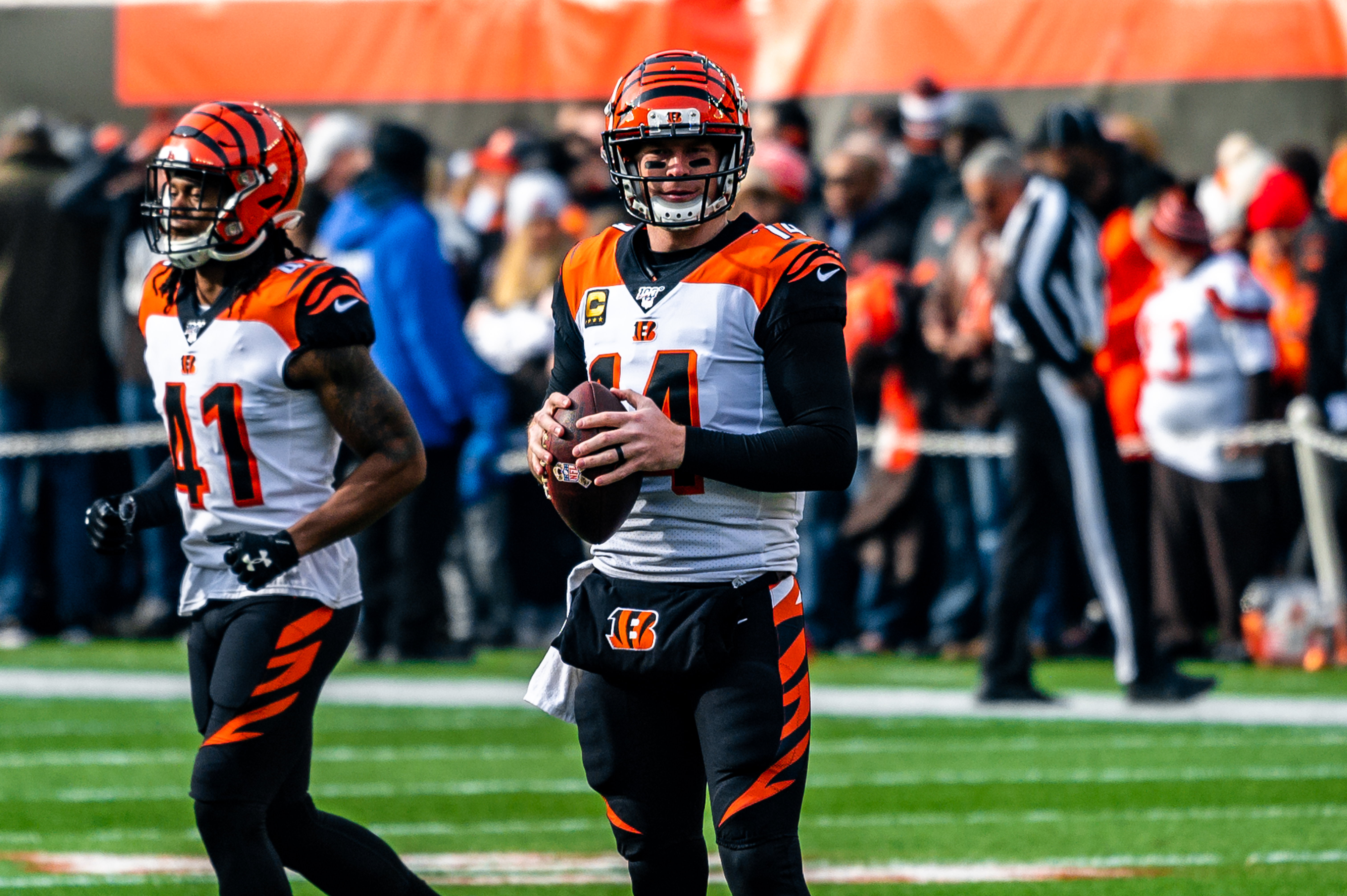 Andy Dalton